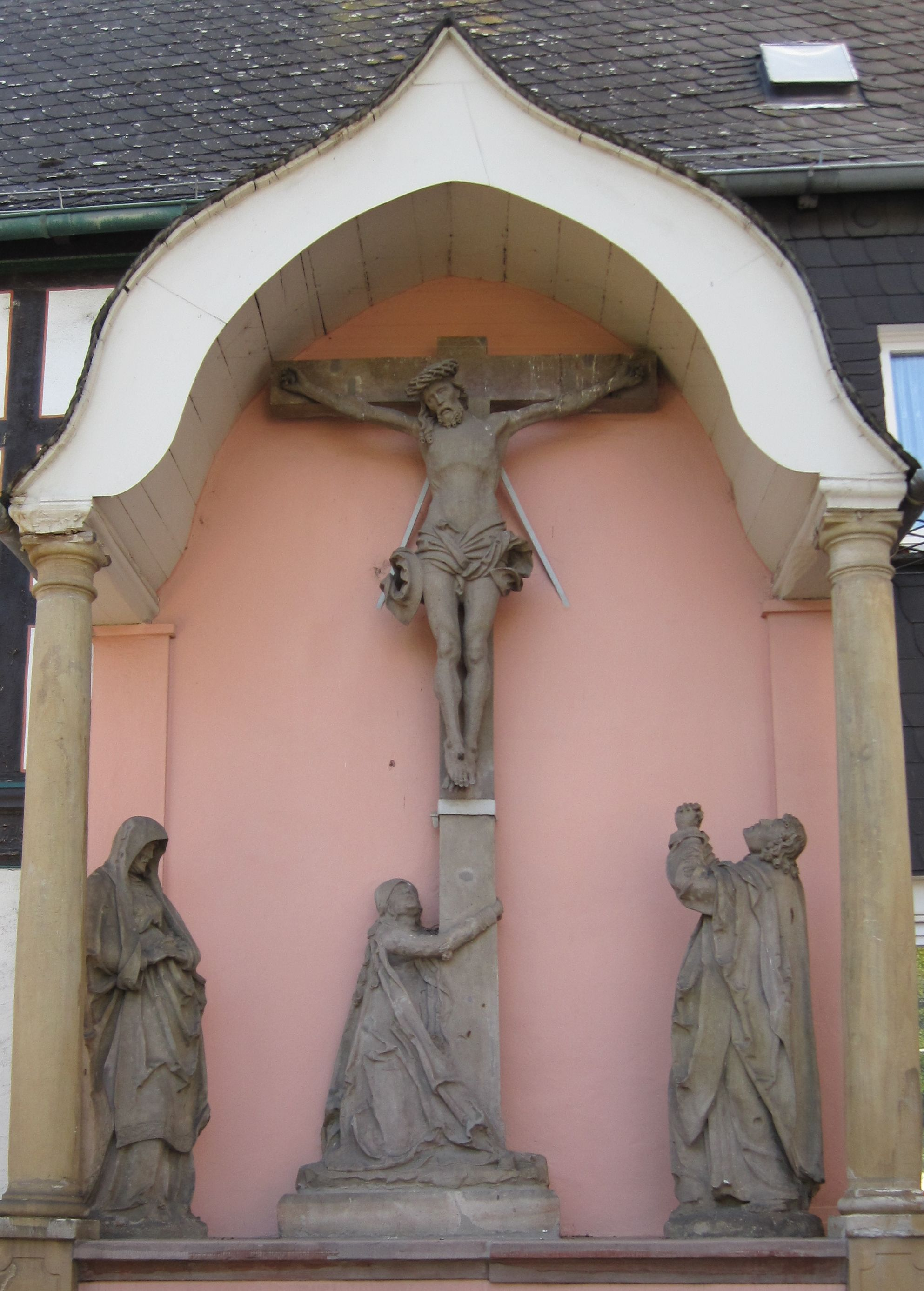 Kreuzigungsgruppe aus der Werkstatt von Hans Backoffen vor der katholischen Pfarrkirche St. Vincentius in Hattenheim, Rheingau-Taunus-Kreis